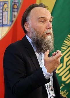 ششمین کنفرانس بین المللی افق نو